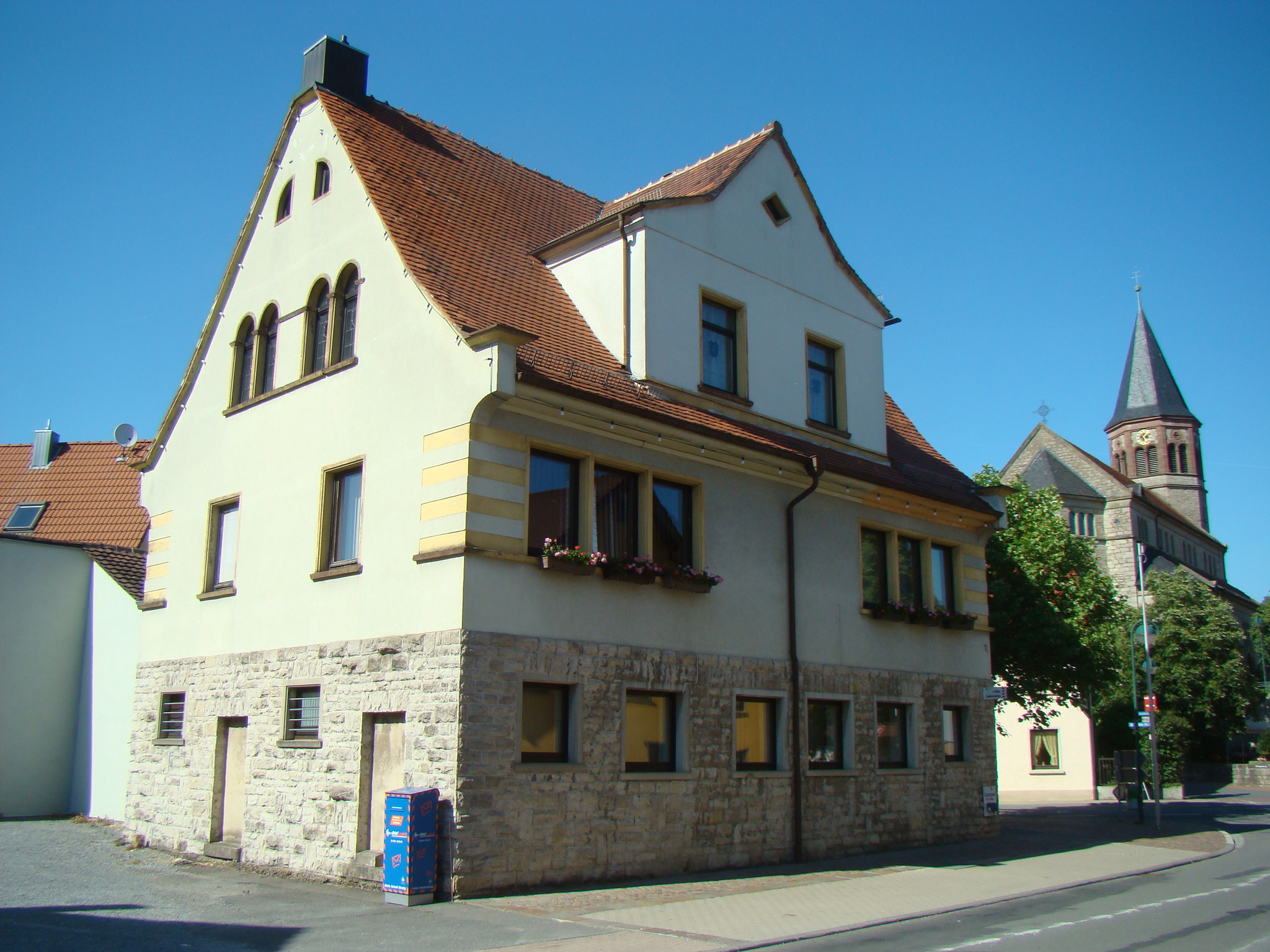 Altes Rathaus in Assamstadt